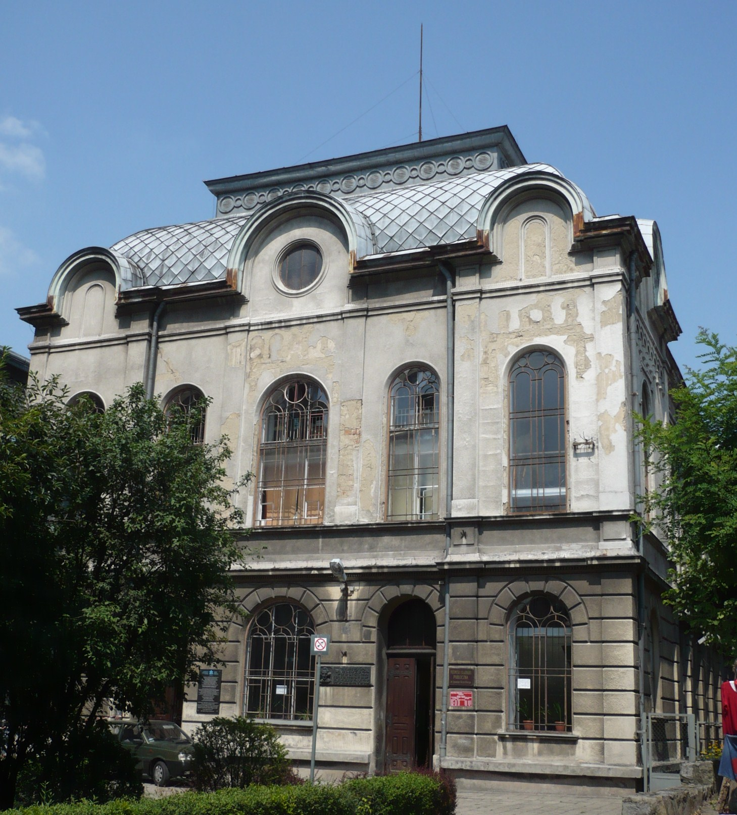 Przemyśl, Nowa Synagoga